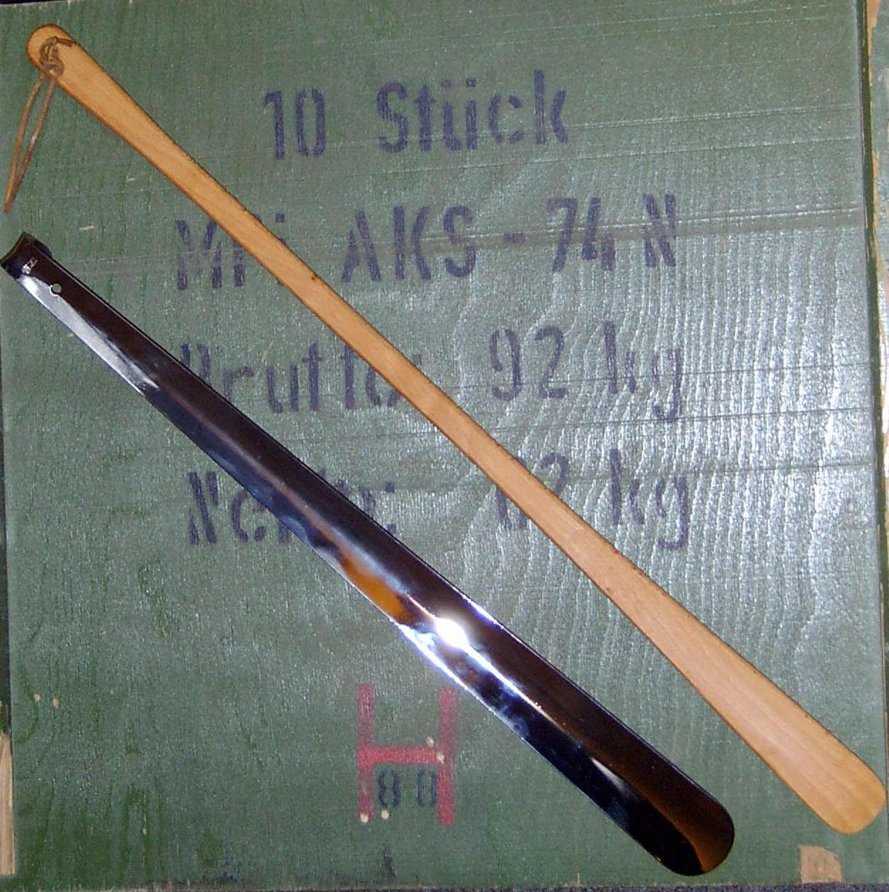 Schuhlöffel aus Holz bzw. Metall